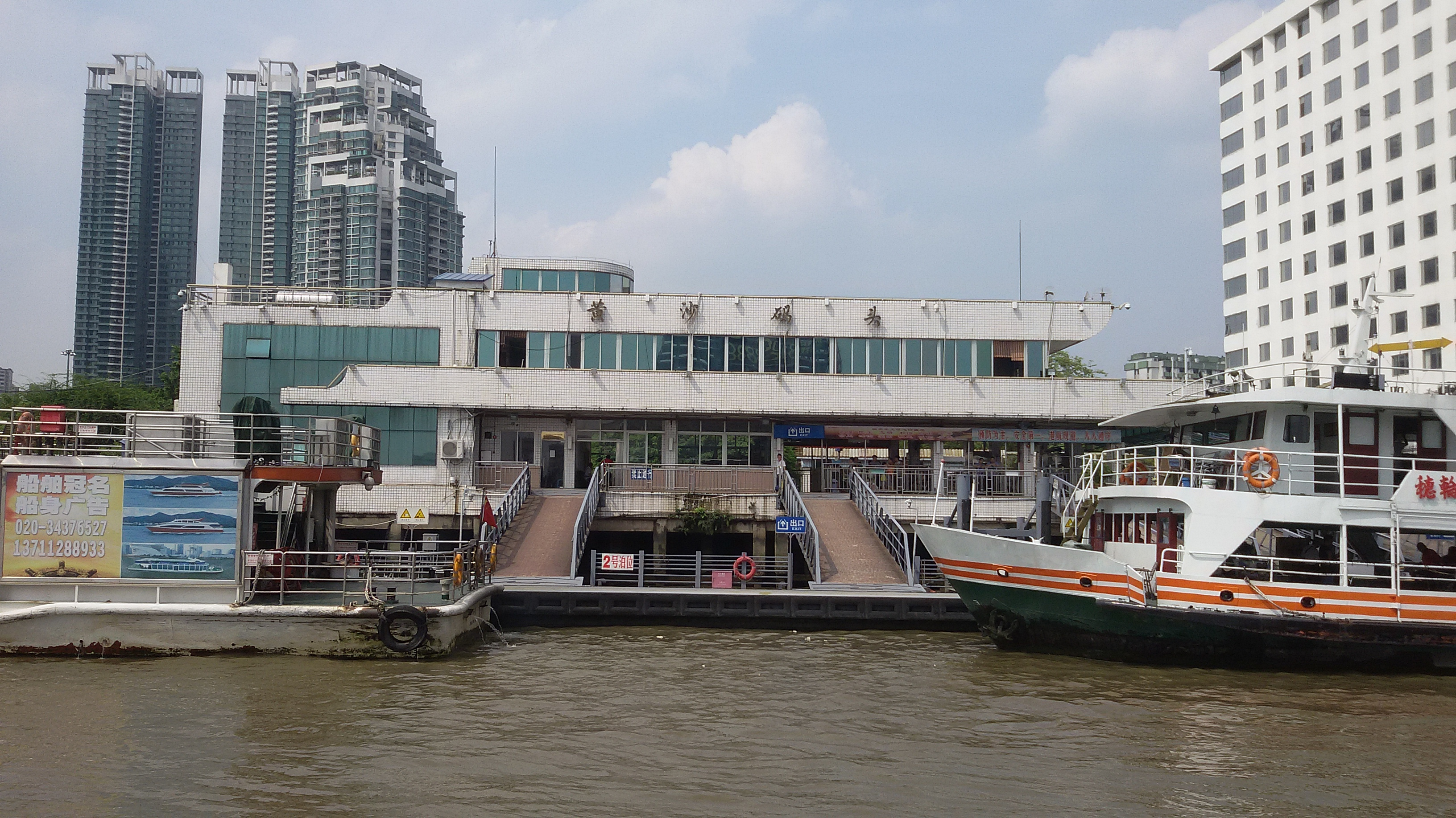 粵語: 黃沙碼頭